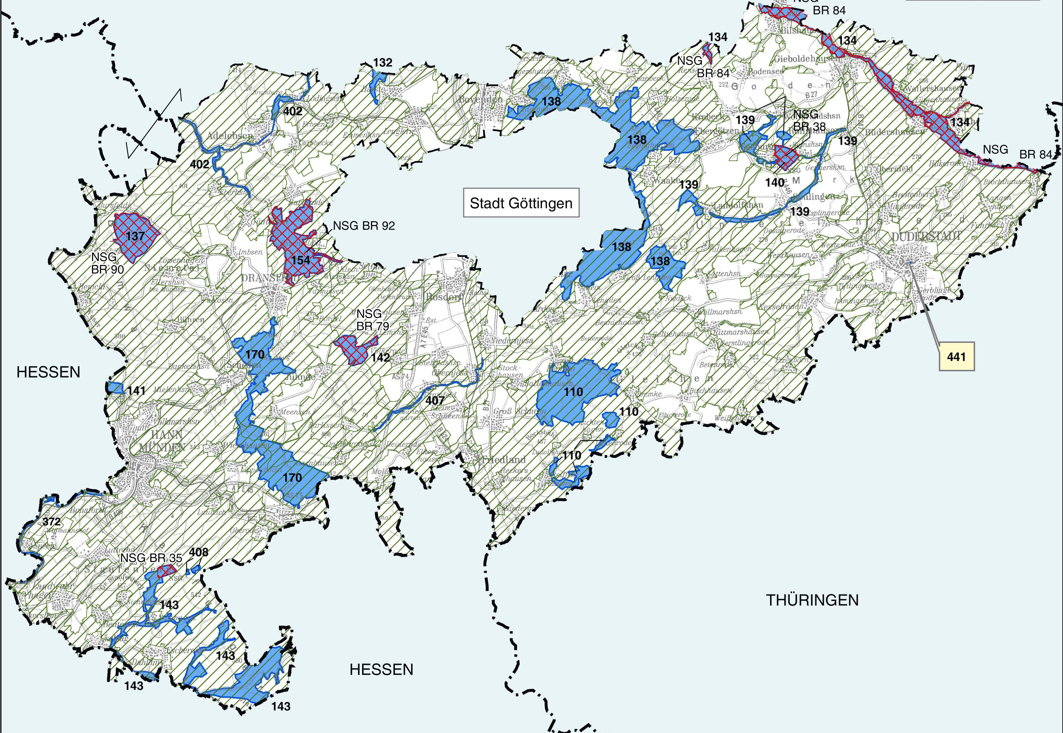 FFH-Gebiete im Landkreis Göttingen